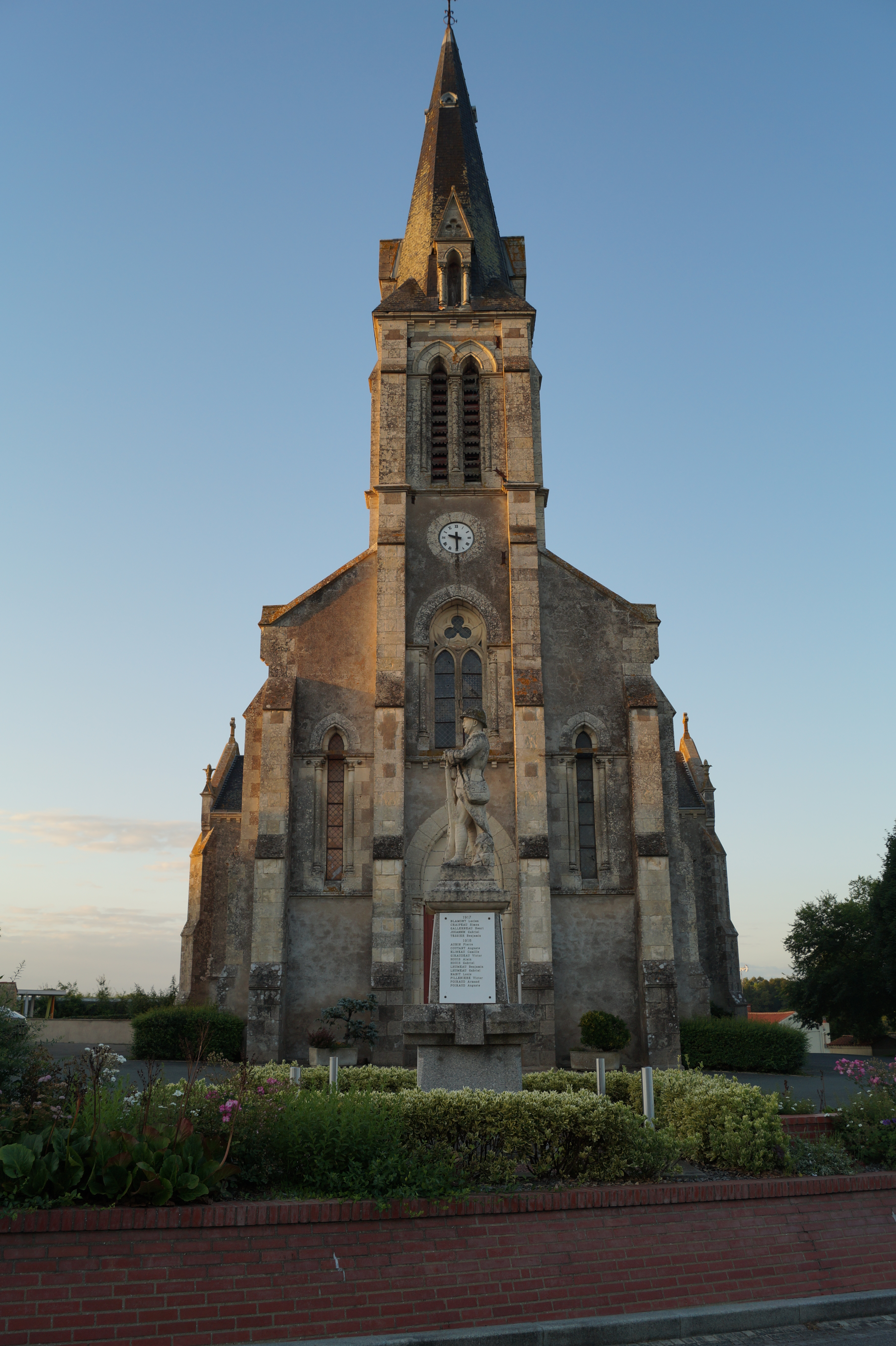 L’église Saint-Sauveur de Chaillé-sous-les-Ormeaux depuis la place de l’Église.